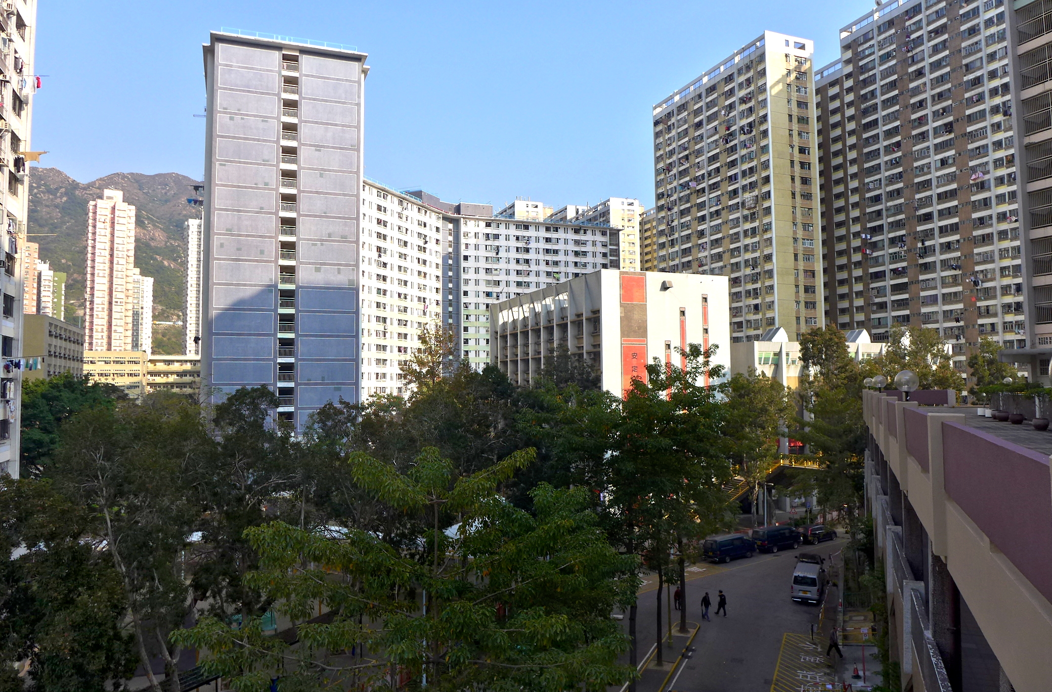 On Ting Estate